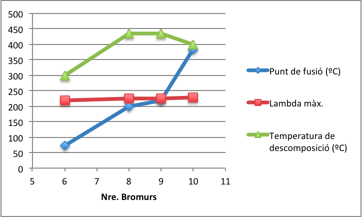 Variació d'algunes propietats fisicoquímiques dels PBB amb el grau de bromació segons IPCS 1994